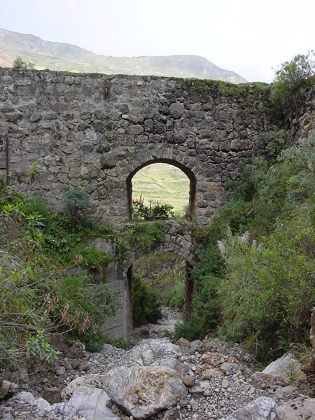 Puente de 2 Niveles, Acoria